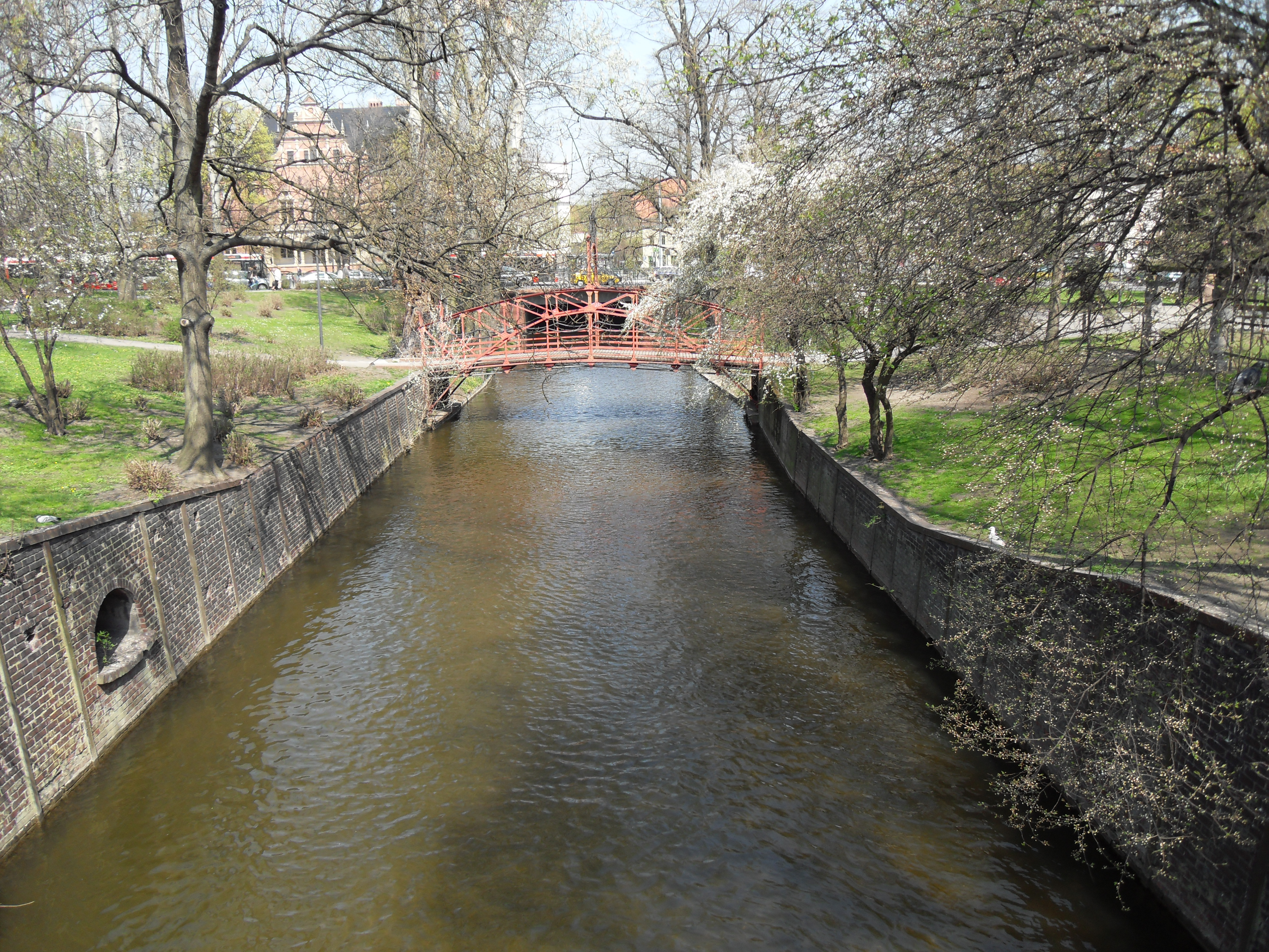 Gdańsk Śródmieście. Kanał Raduni i park Mały Błędnik.